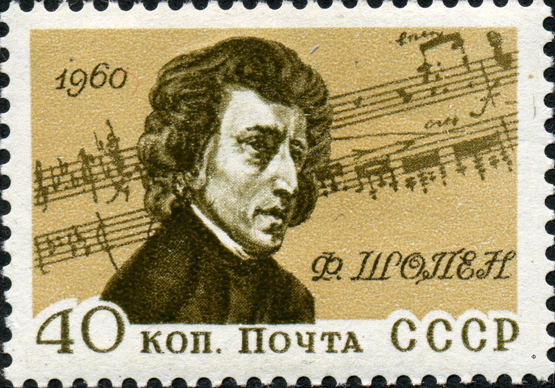 Марка СССР. ЦФА 2505. Портрет Ф. Шопена по картине Э. Делакруа (1838), фрагмент этюда до минор, соч. 10 № 12 (факсимиле). Оформление А. Ольхова. Тираж — 1,5 млн экз.